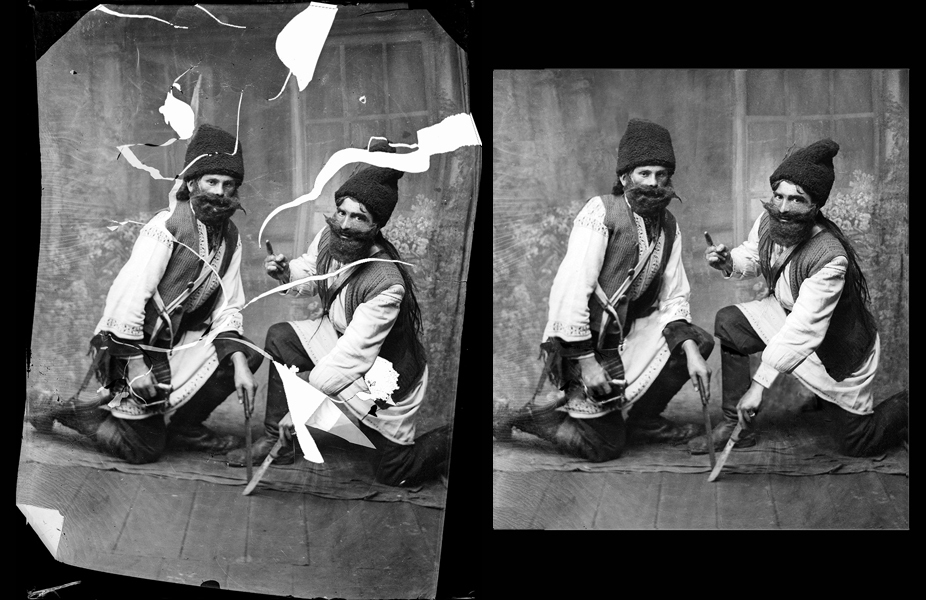 Example of digital restorations and reconstruction of antique image "Doi călușari"